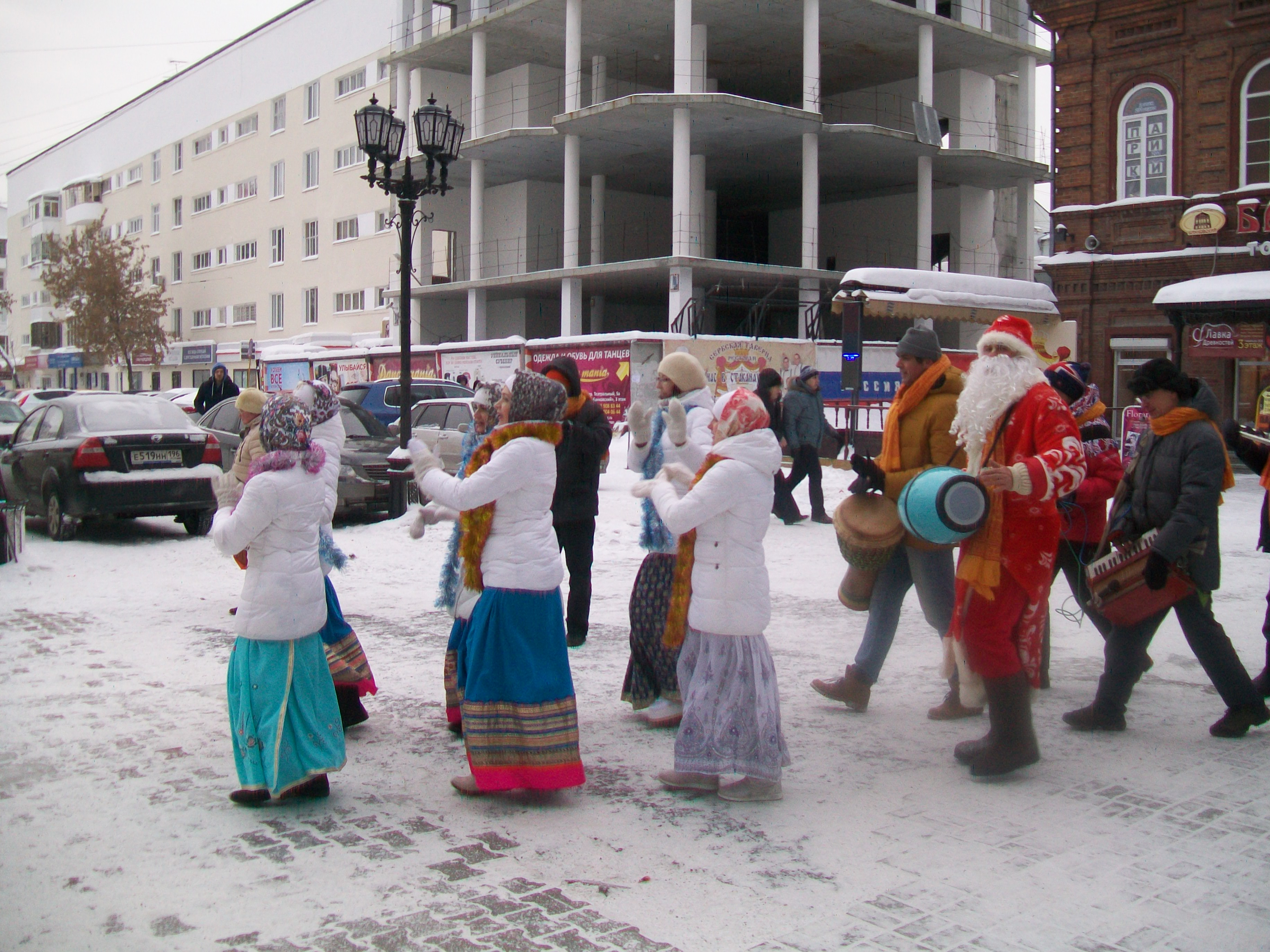 Фото кришнаитской процессии с Дедом Морозом в Екатеринбурге, 2017 год, примерно январь